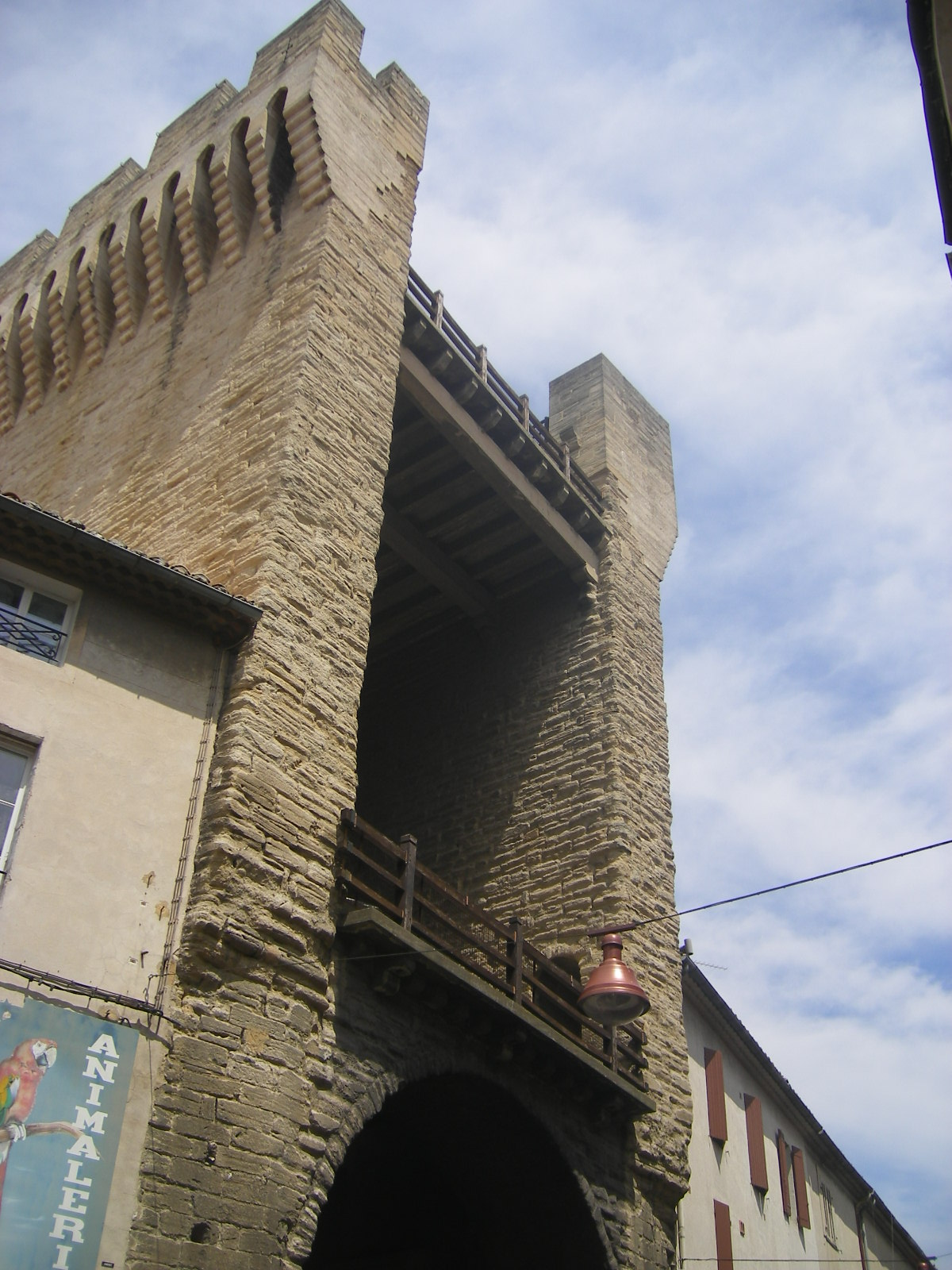 Carpentras